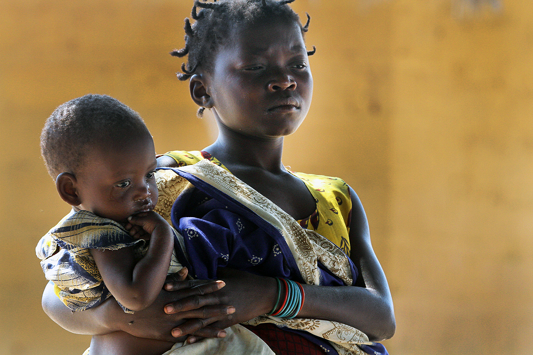 Mozambique 02000